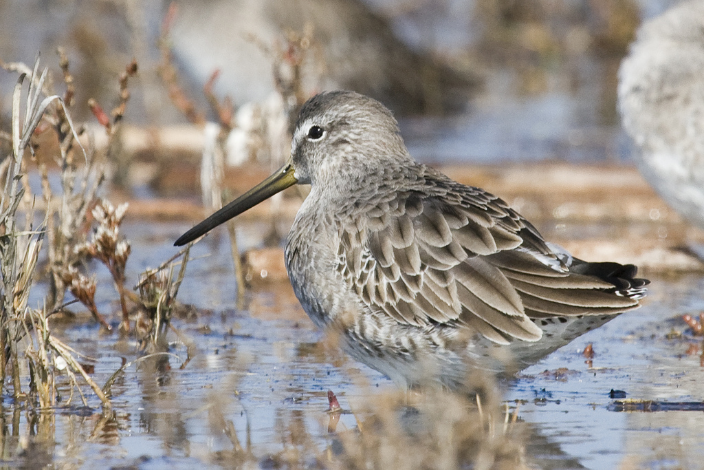 Limnodromus griseus; Bécassin roux